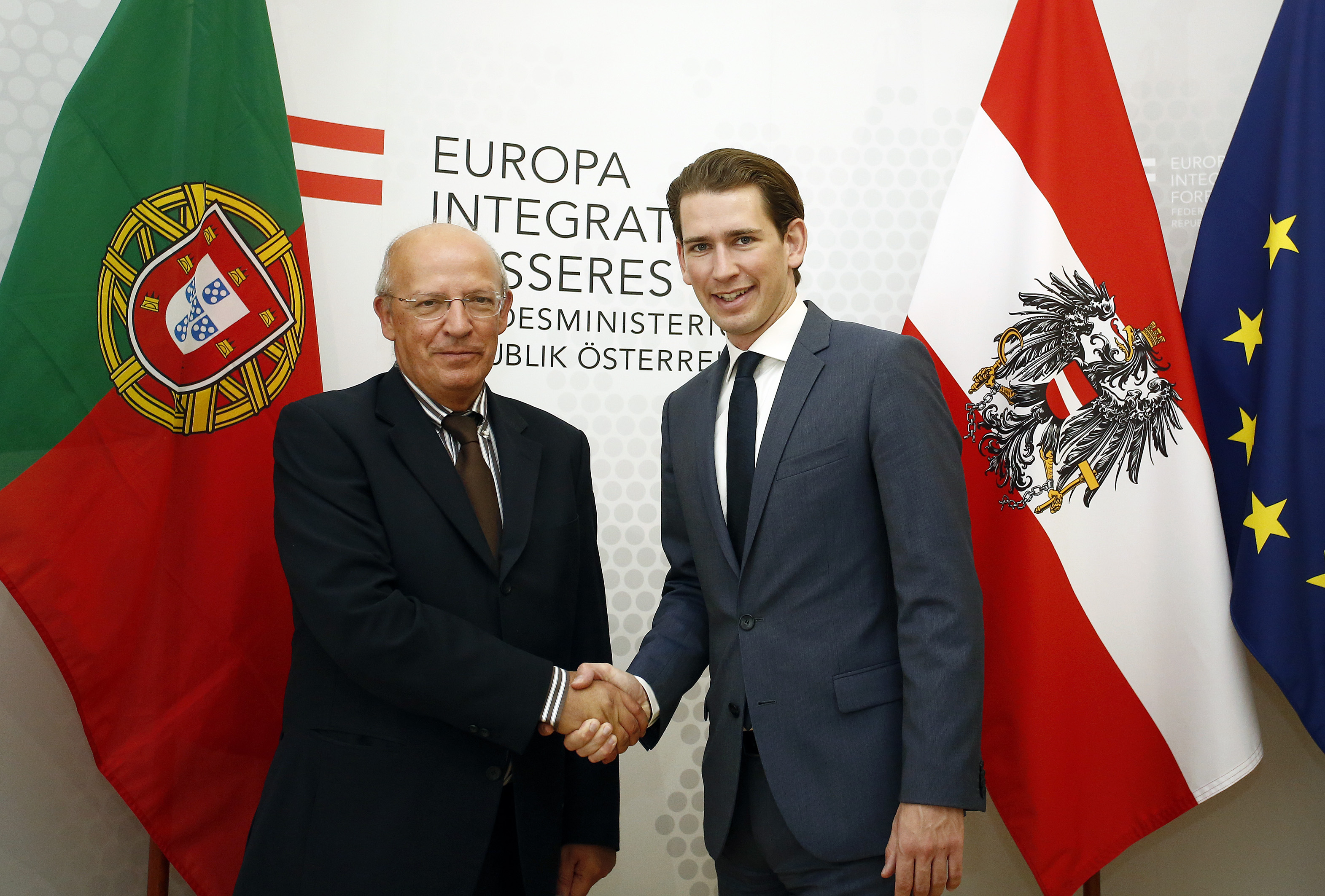 Bundesminister Sebastian Kurz empfängt den portugiesischen Außenminister Augusto Santos Silva in Wien. 13.09.2016, Foto: Dragan Tatic